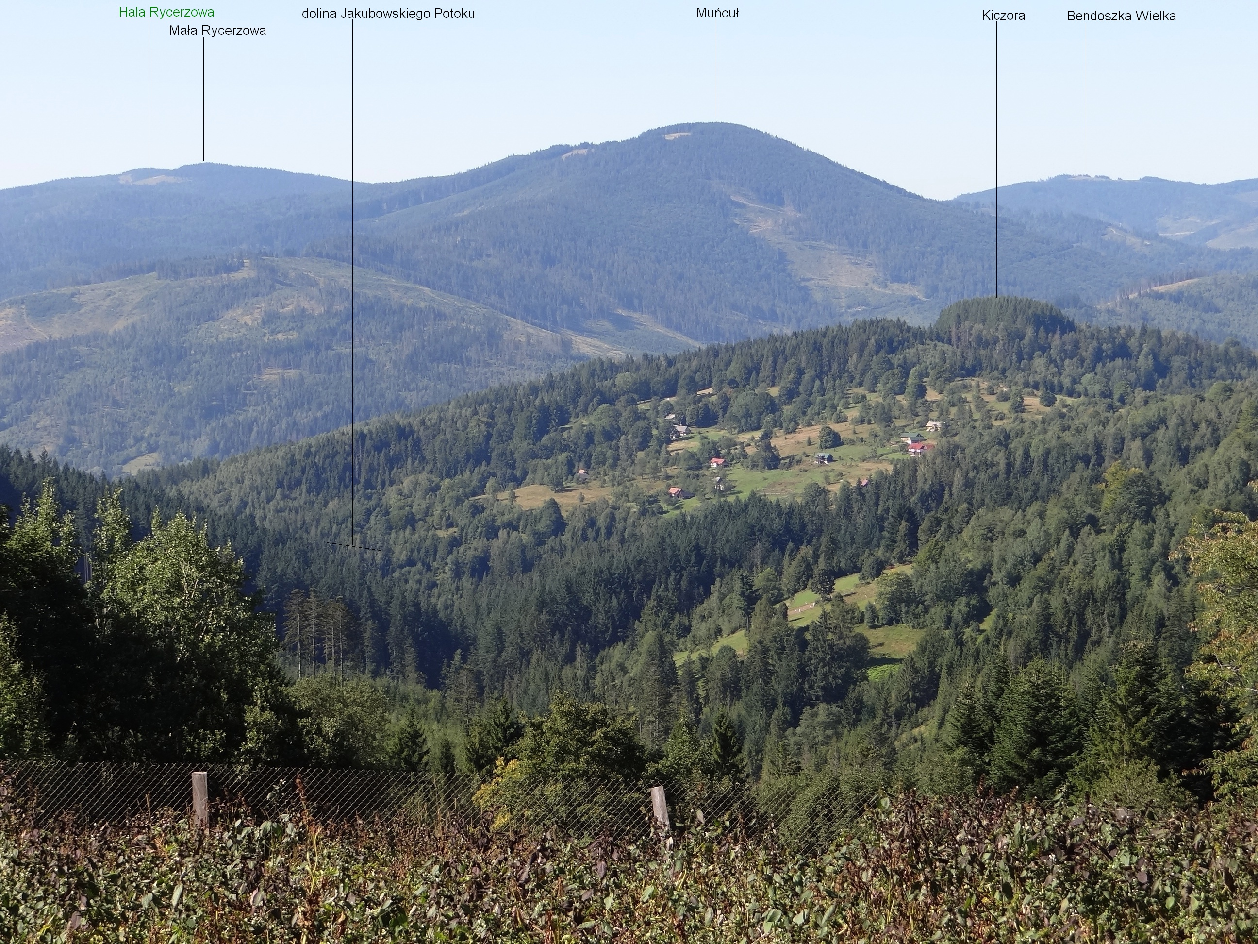 Widok z osiedla Zapolanka w Złatnej